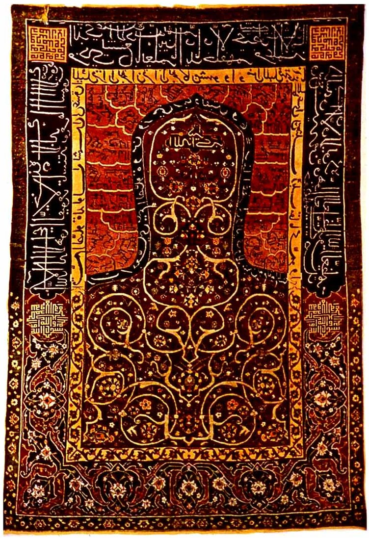 Azerbaijan Namazlik rug. Tabriz croup. 15 century.